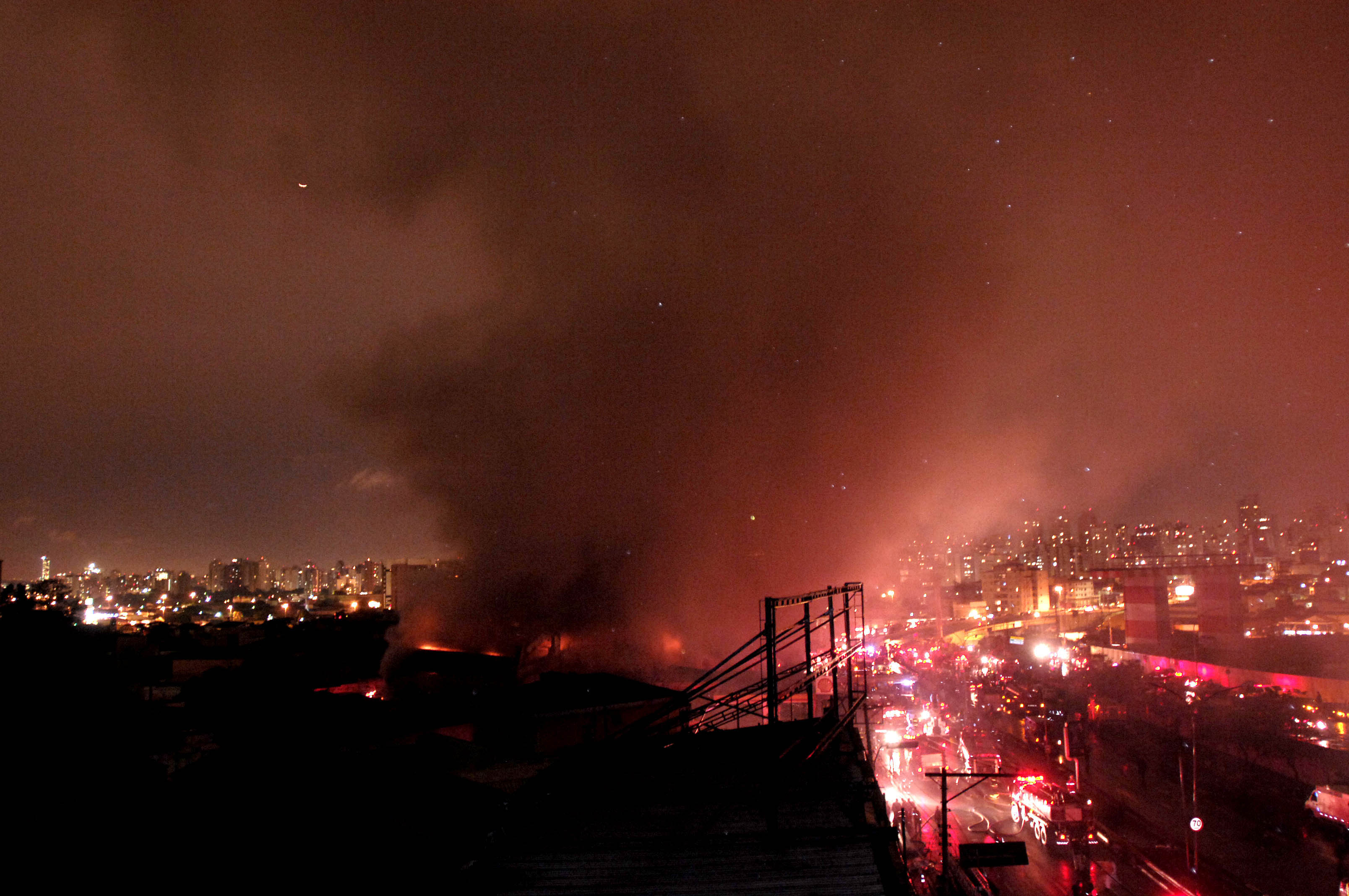 São Paulo - Fumaça sai do depósito da TAM atingido pelo avião do vôo JJ 3054 da companhia, na Avenida Washington Luís.